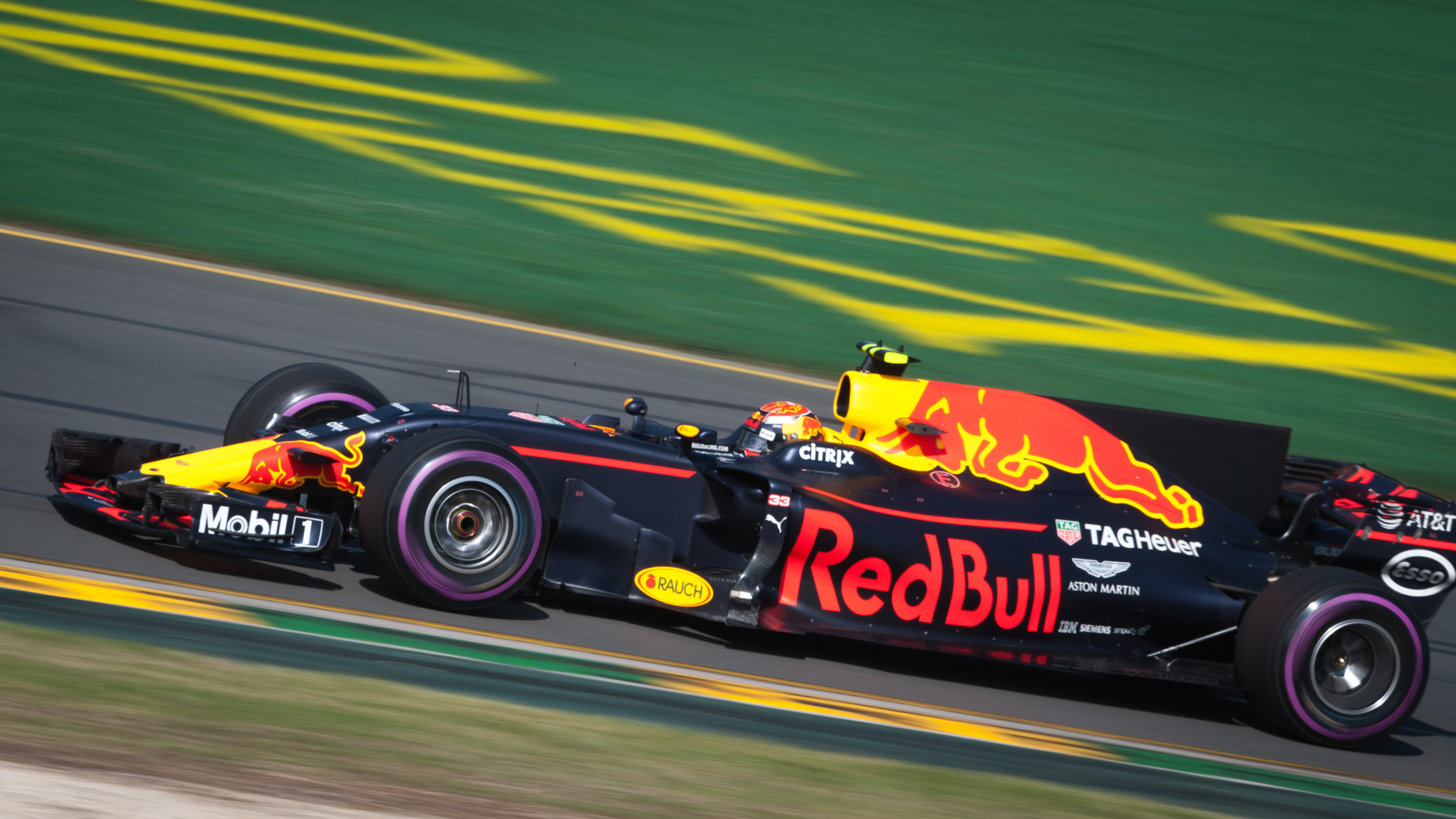 Max Verstappen